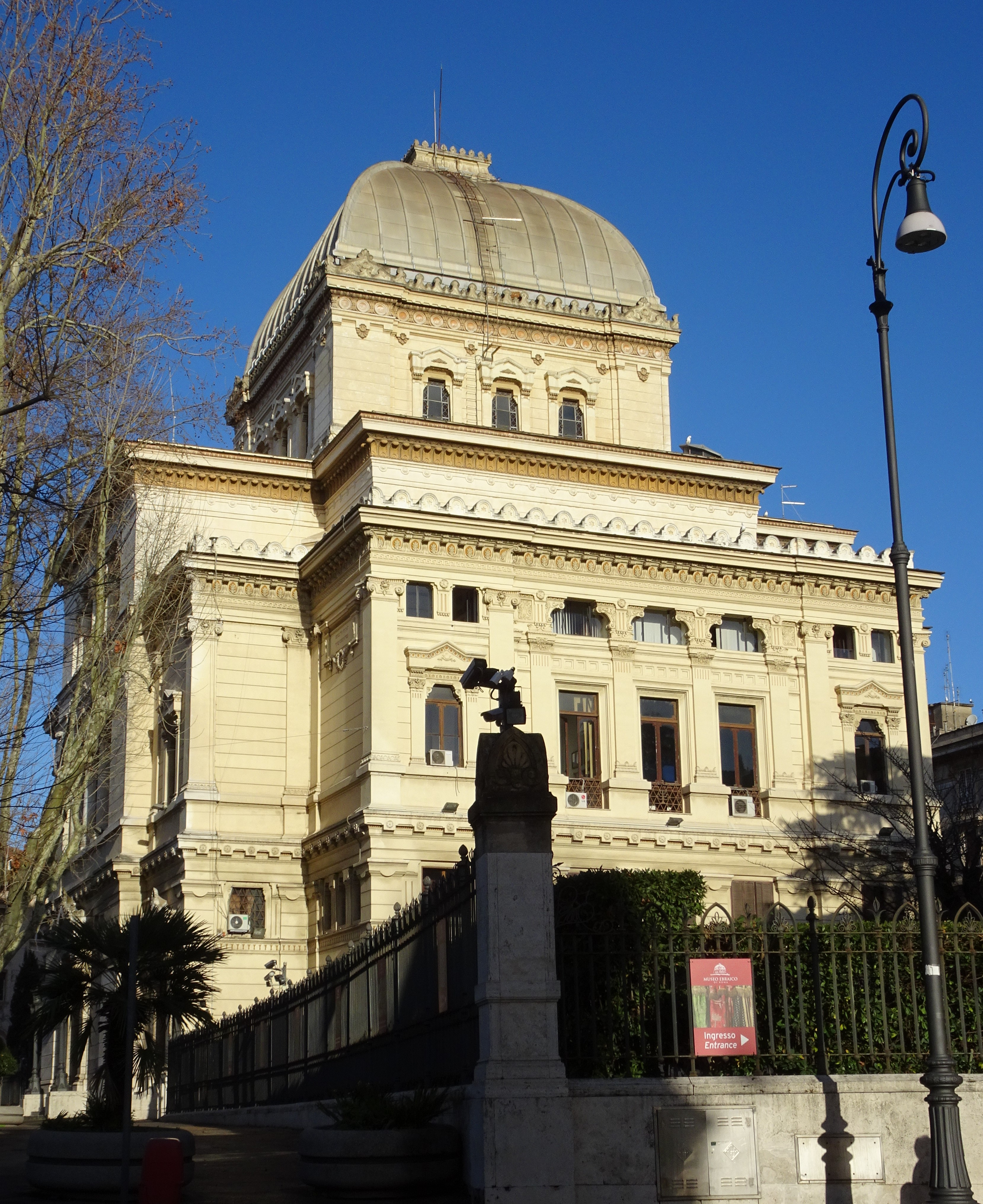 De Grote Synagoge van Rome, gezien vanaf de Lungotevere de'Cenci